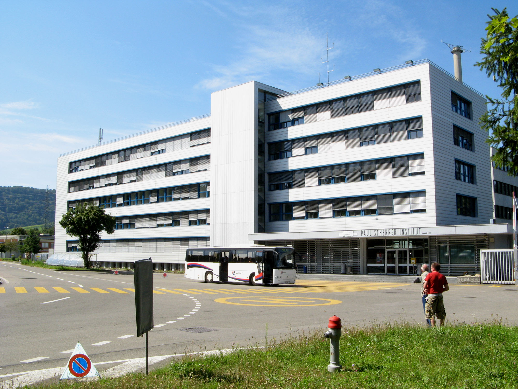 Paul Scherrer Institut, Areal Ost, Würenlingen